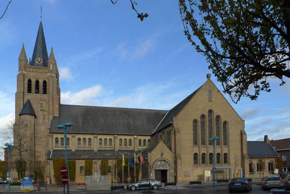 Marktplaats_001